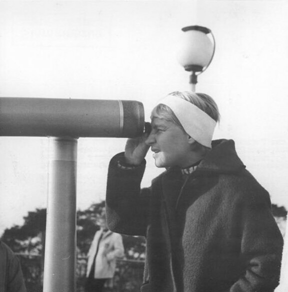 Factual corrections and alternative descriptions are encouraged separately from the original description. Additionally errors can be reported at this page to inform the Bundesarchiv. Original historic description: Berlin, Müggelturm, Eisschnellläuferinnen, Ashworth, Smith Zentralbild Studré 22.2.1964 Amerikanische Eisschnellläuferinnen starten in Berlin Jeanne Ashworth (am Fernrohr) und Janice Smith (beide USA) betrachten voller interesse die Umgebung des Müggelturmes. Die amerikanischen Olympia-Teilnehmerinnen unternahmen vor ihrem Start bei den internationalen Eisschnelllauf-Wettbewerben der Frauen im Berliner Dynamo-Sportforum (22. und 23.2.1964) einen kleinen Ausflug zum Müggelturm.